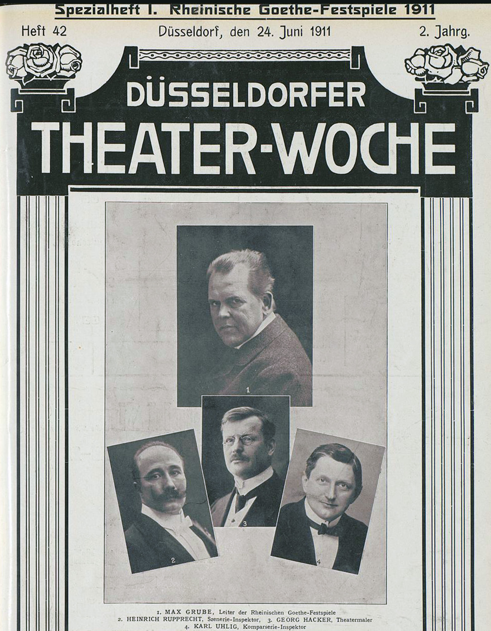 Max Grube (1), Heinrich Rupprecht (2), Georg Hacker (3), Karl Uhlig (4), Rheinische Goethe-Festspiele 1911, Titelblatt Düsseldorfer Theater-Woche, 24. Juni 1911, 2. Jahrg., Heft 42